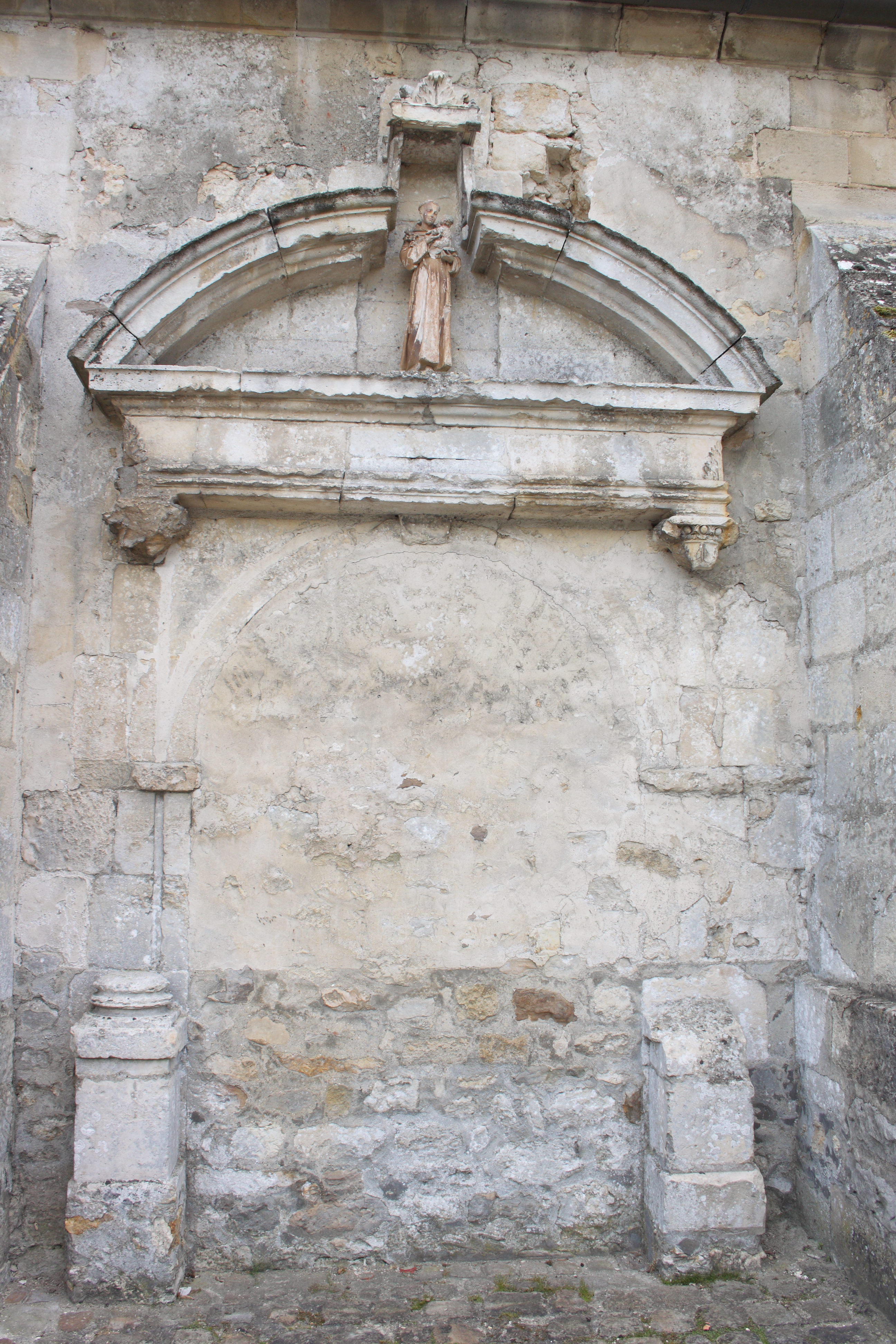 katholische Kirche Notre-Dame-de-l'Assomption in Vauréal